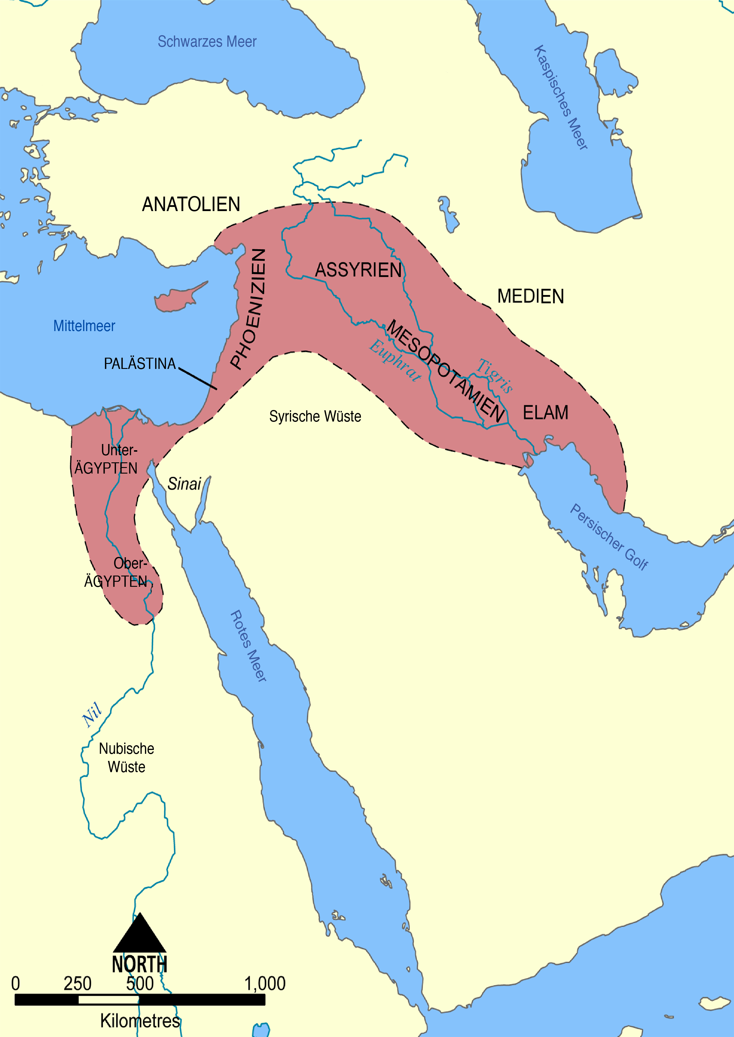 Karte des Fruchtbaren Halbmondes, etwa 7500 v. Chr.